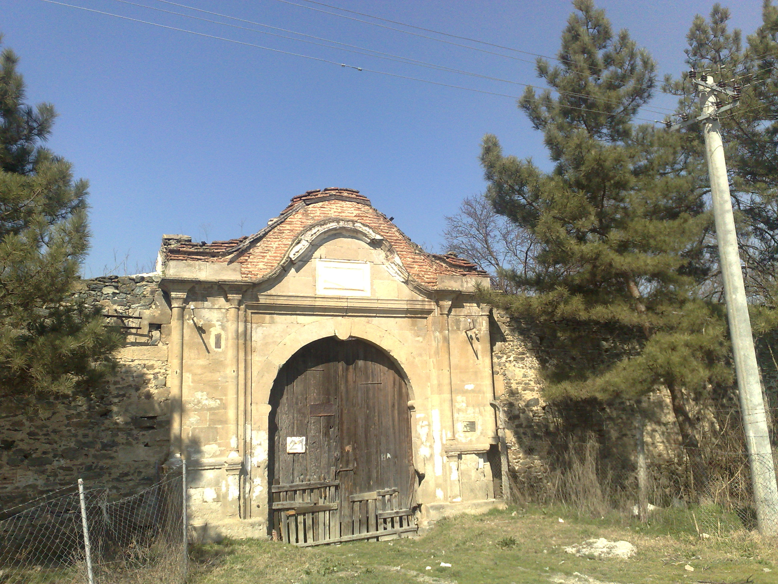 Портата на Хавзипашините конаци во с.Бардовци